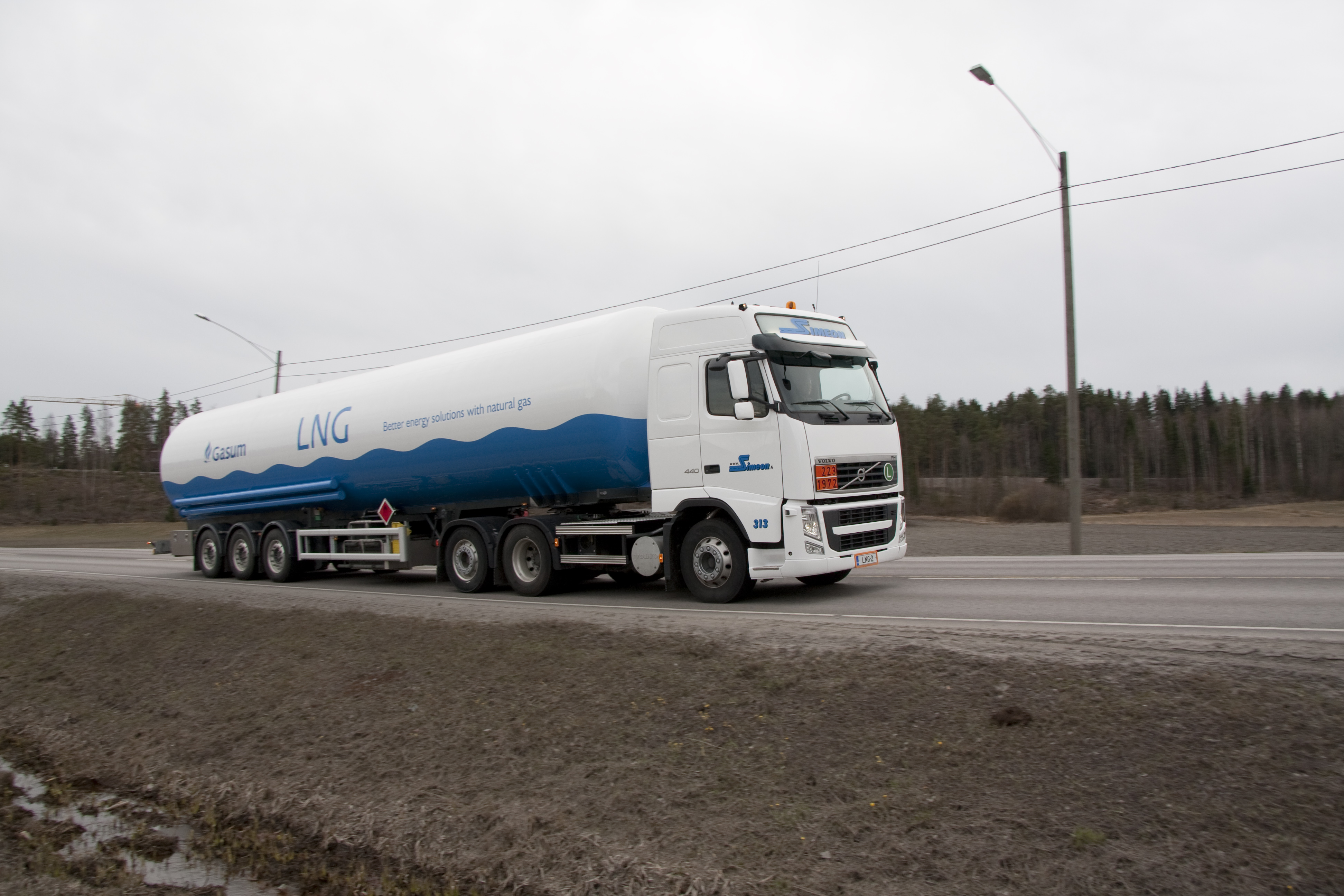 Maakaasua kuljetetaan nesteytettynä maakuljetuksena. Suomi, 2007